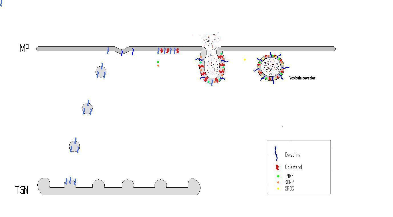 Esquema sobre la acción de las proteïnas Cavin en las caveolas.